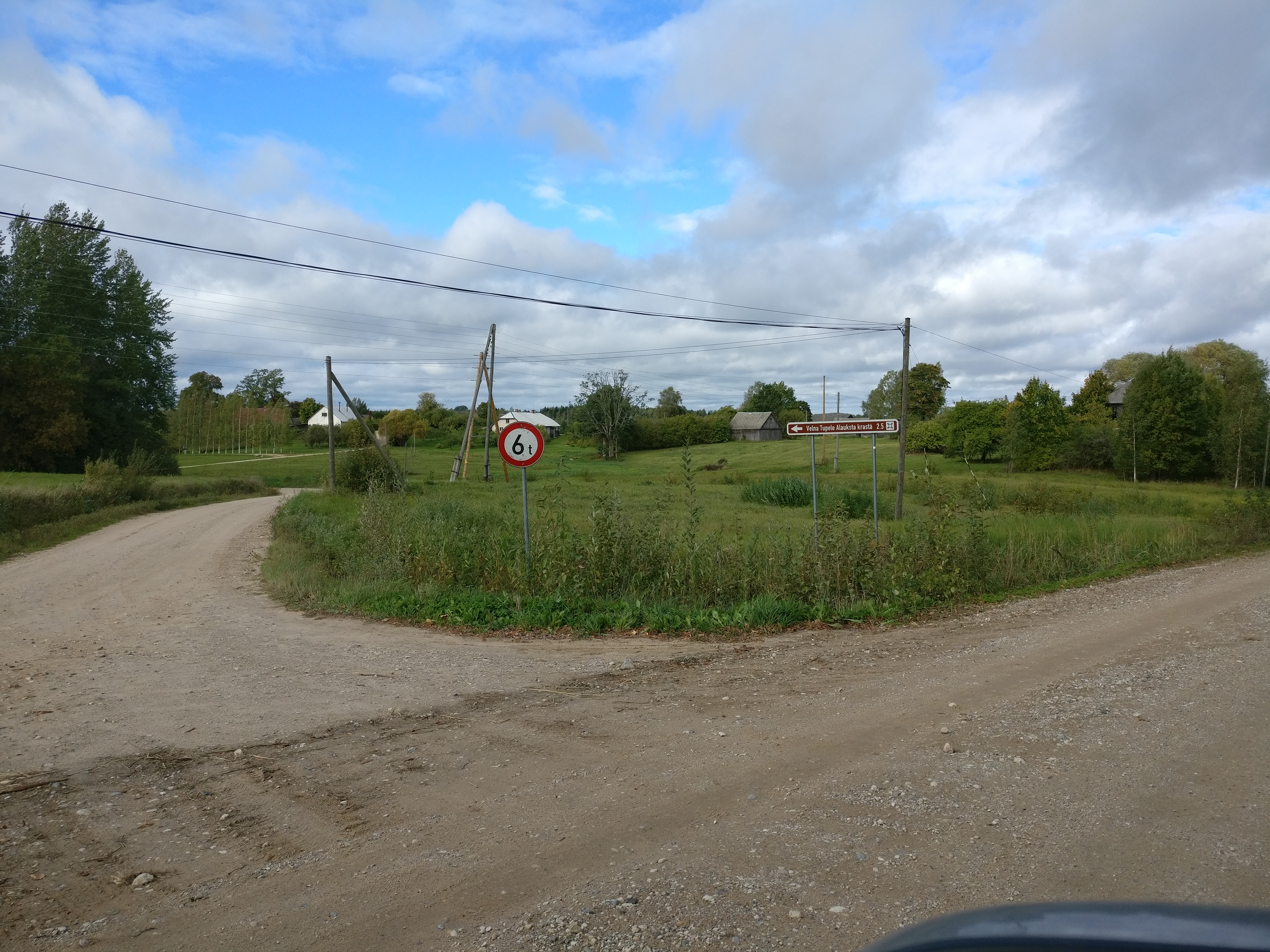 Greiveri (ciems)